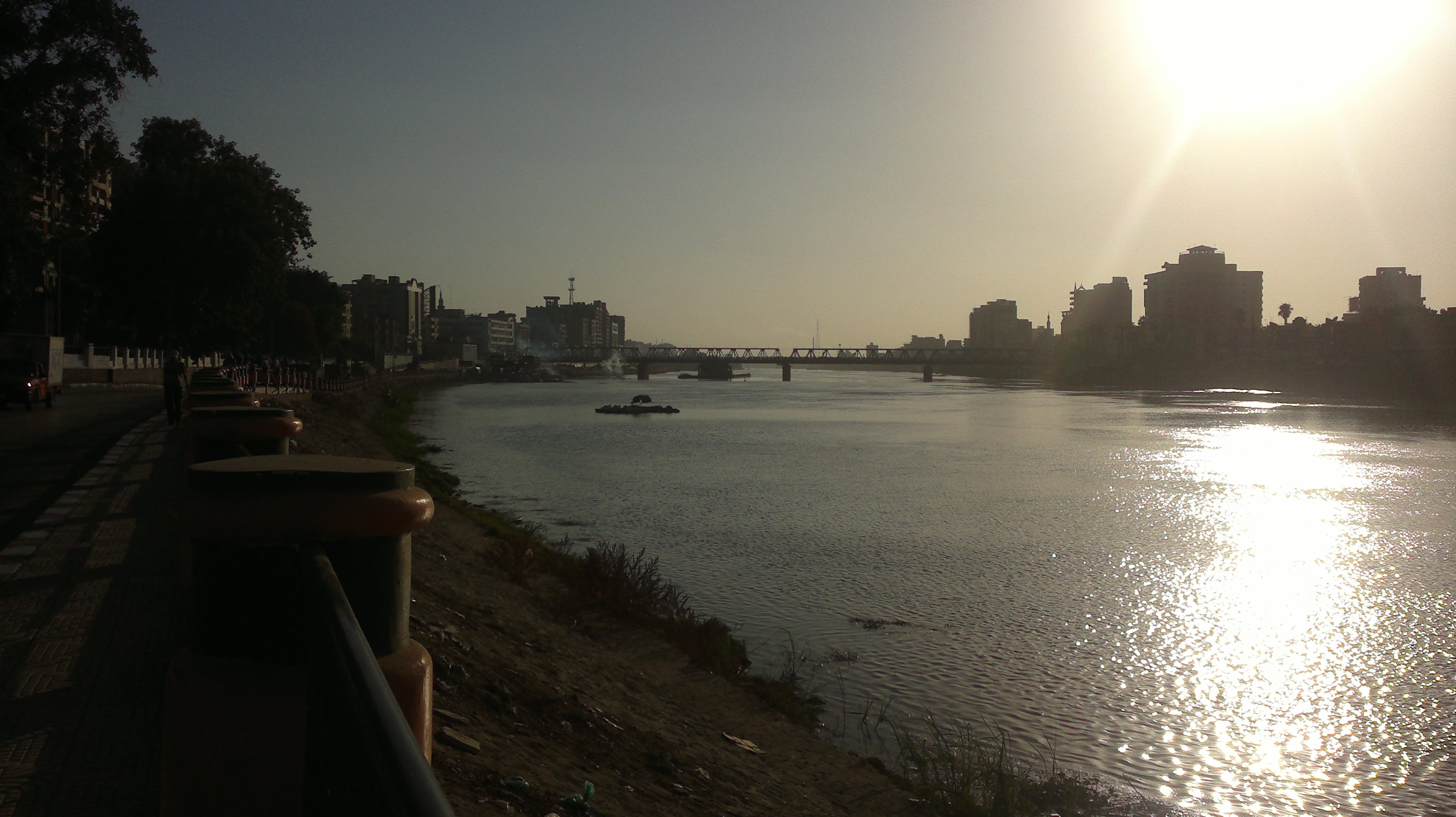 فرع دمياط، نهر النيل، المنصورة، الدقهلية، مصر